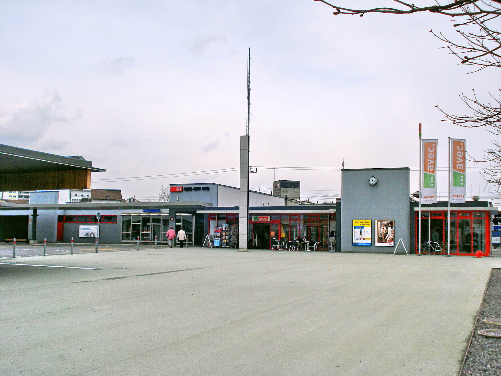 Bahnhof Rotkreuz